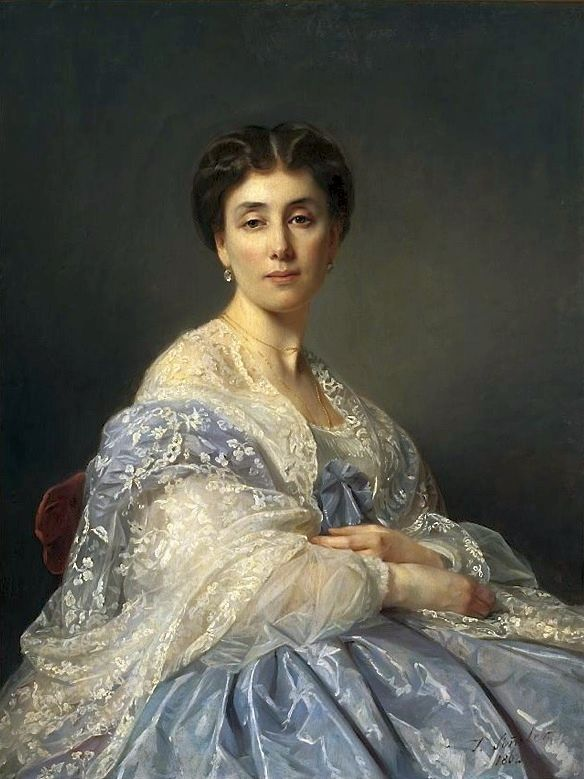 Баронесса Александра Затлер, жена генерала барона Фёдора Карловича Затлера.